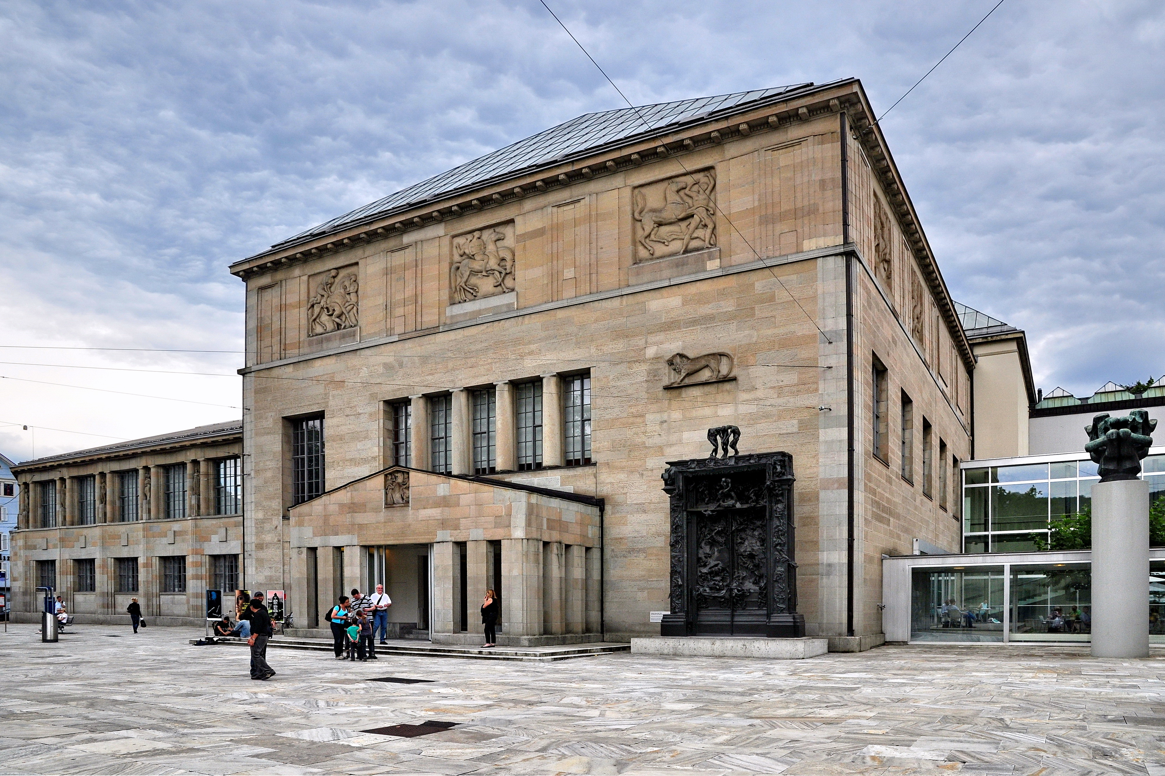 Kunsthaus in Zürich (Switzerland)